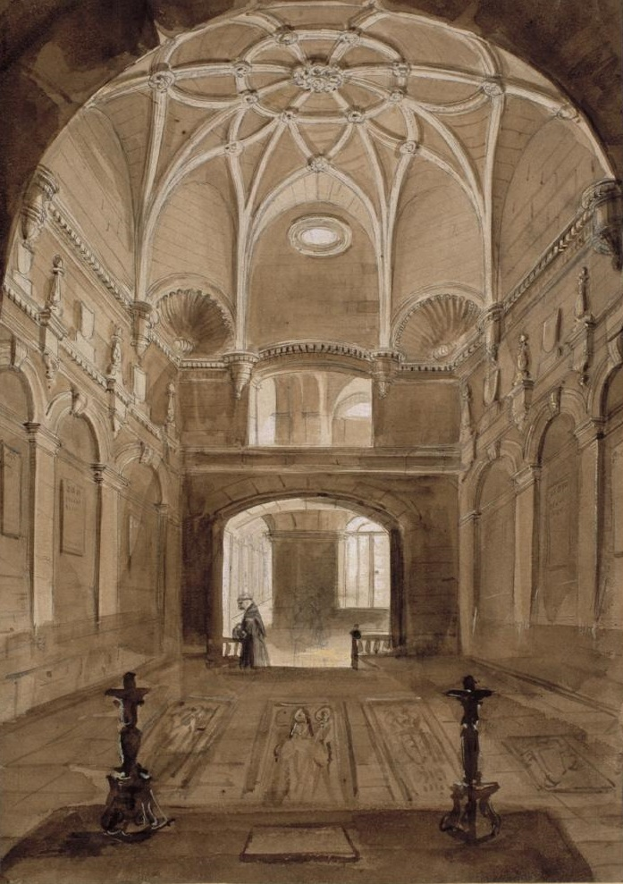 Dibujo decimonónico que representa la capilla de los Linajes del desaparecido convento de San Francisco de Valladolid, que fue demolido en 1836, durante la Desamortización de Mendizábal. Provincia de Valladolid, (España).